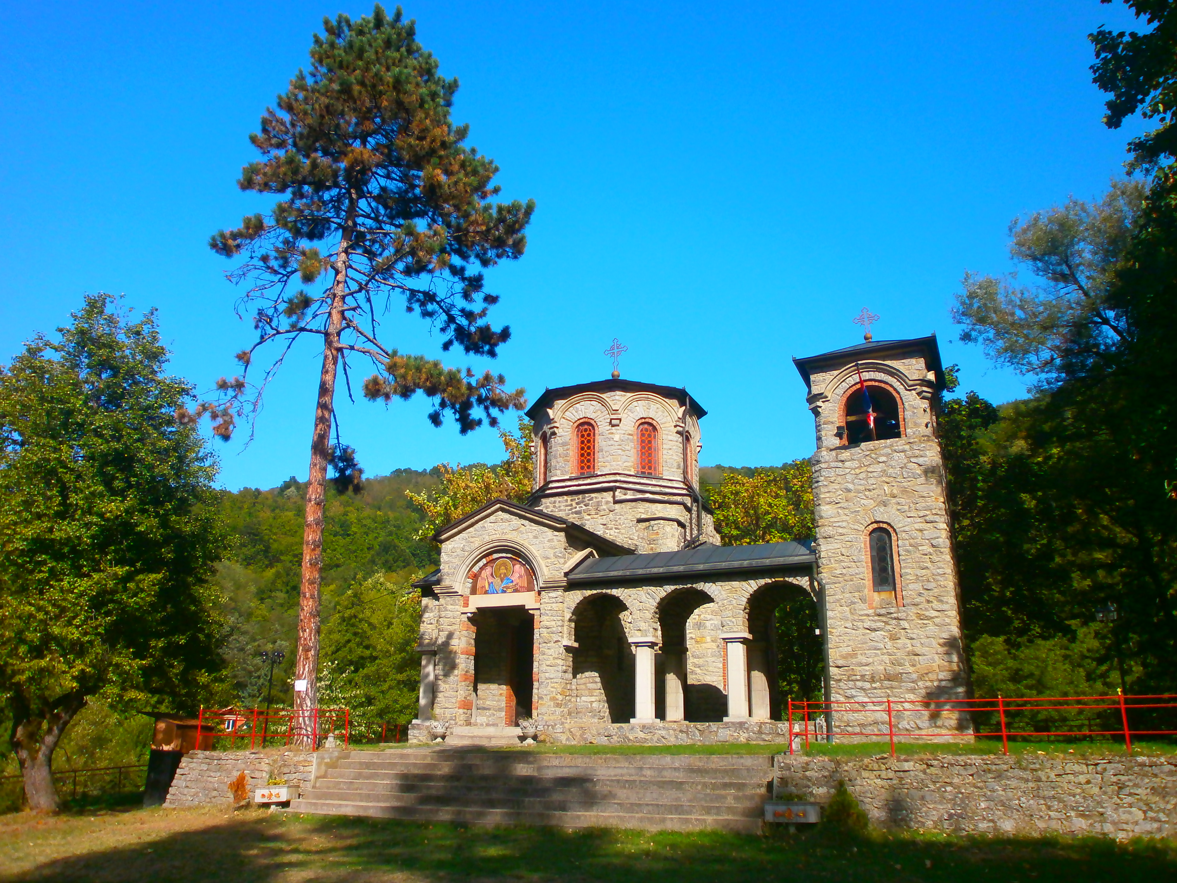 Srpski (latinica): Crkva Rođenja Svetog Jovana Krstitelja, Vučje, Leskovac